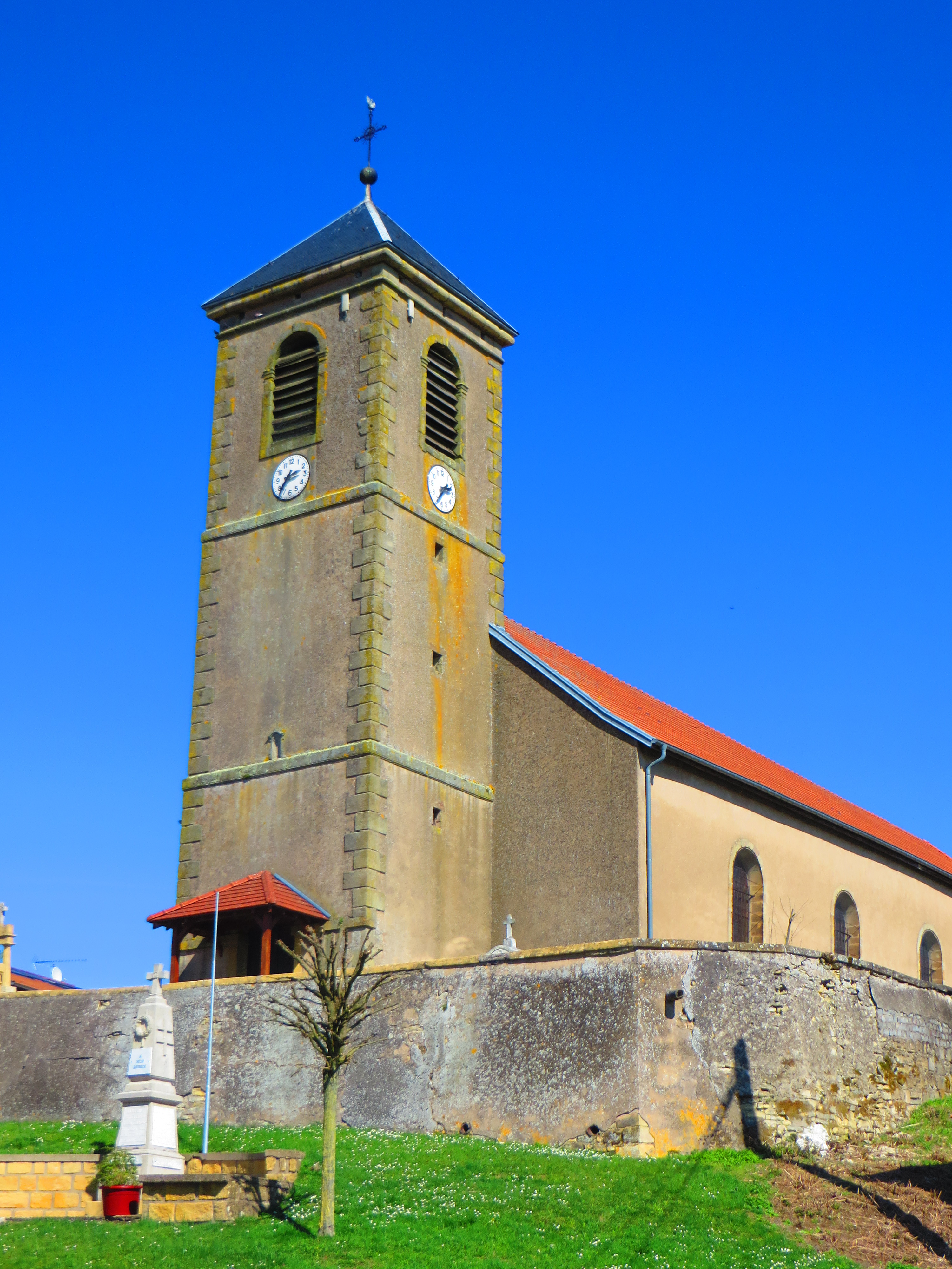 Landroff Église Saint-Barthélemy